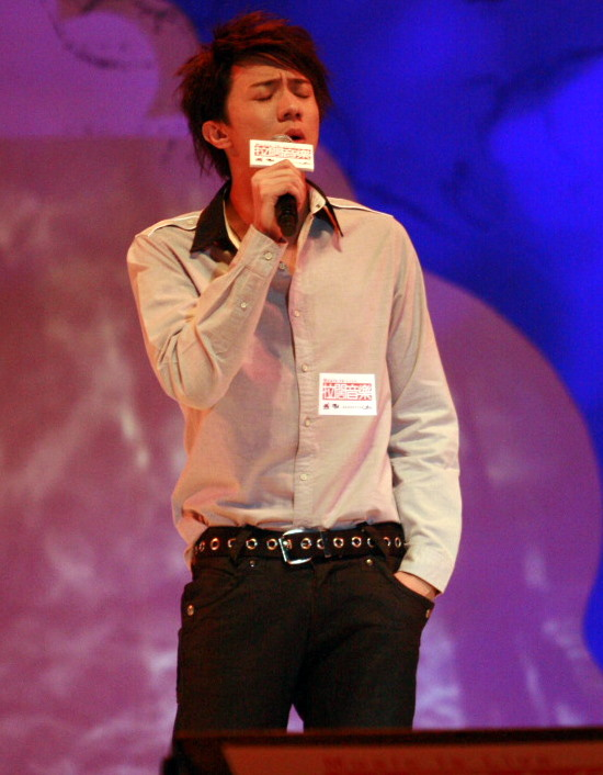 Louis Cheung (張繼聰) 2008